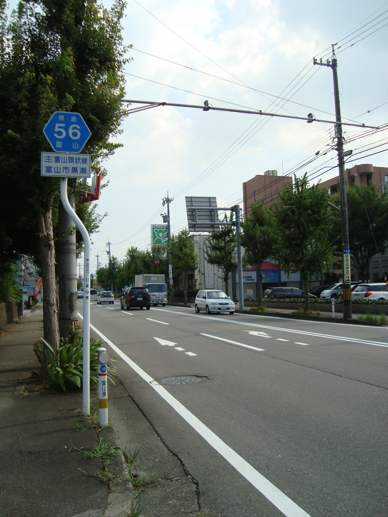 富山県道56号富山環状線 富山市黒瀬北町2丁目付近